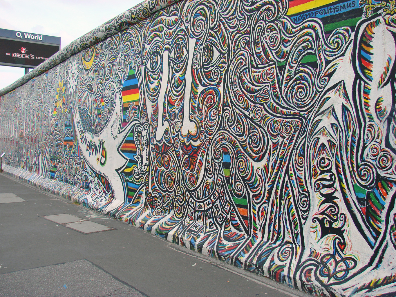 Oeuvre sur East Side Gallery East-Side-Gallery est un tronçon du mur de Berlin parallèle à la Spree et à la Mühlenstrasse qui a été peint par de nombreux artistes internationaux en 1990 sur le thème de la Paix et de la Réconciliation. Le site a été classé aux monuments historiques. Il a été restauré en 2009 à cause du vandalisme mais de nouveaux graffiti ont été à nouveau inscrits sur la plupart des oeuvres. Article de Wikipedia site officiel